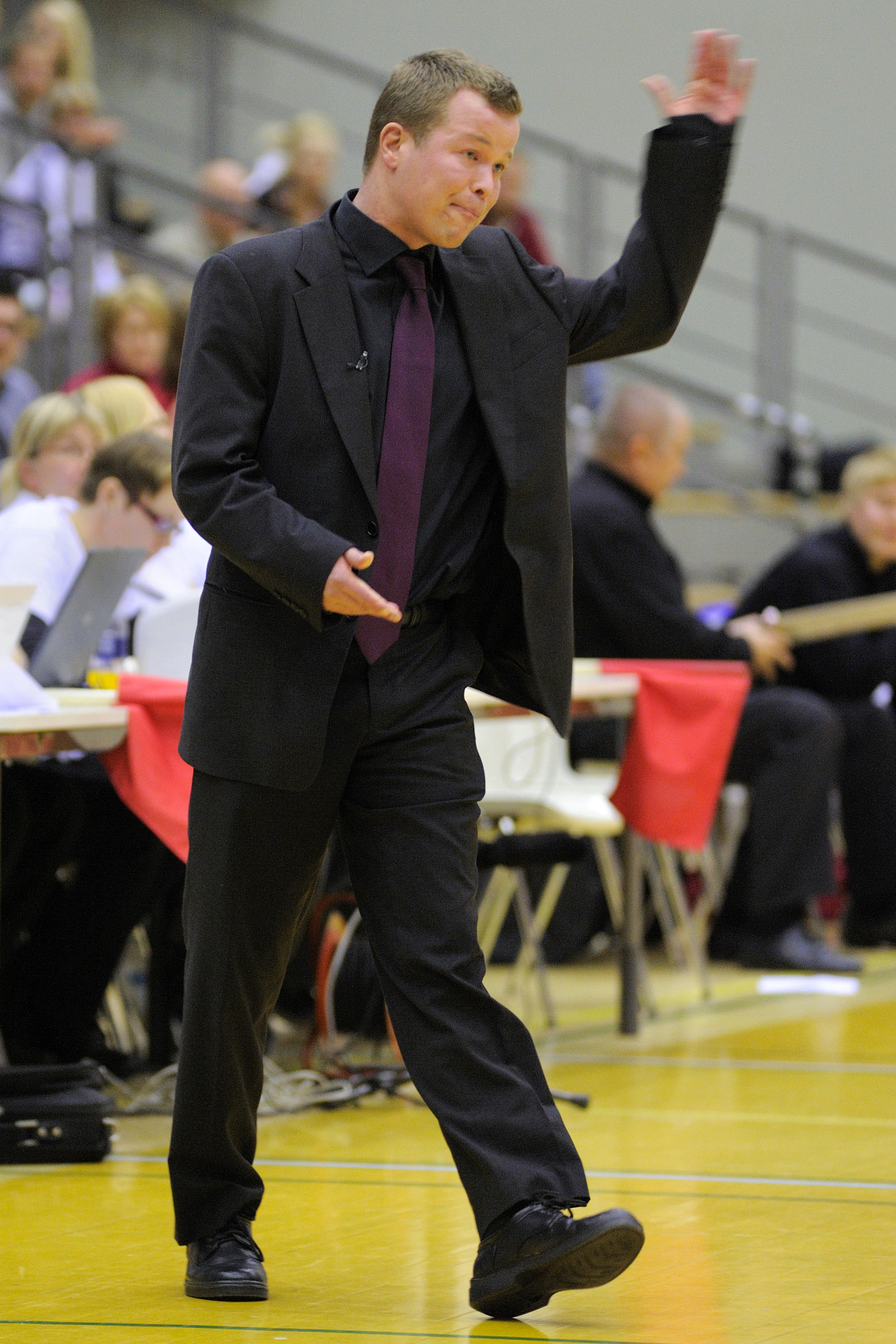 Koripallovalmentaja Pieti Poikola 26.1.2011 ottelussa Lappeenrannan NMKY - Tampereen Pyrintö.